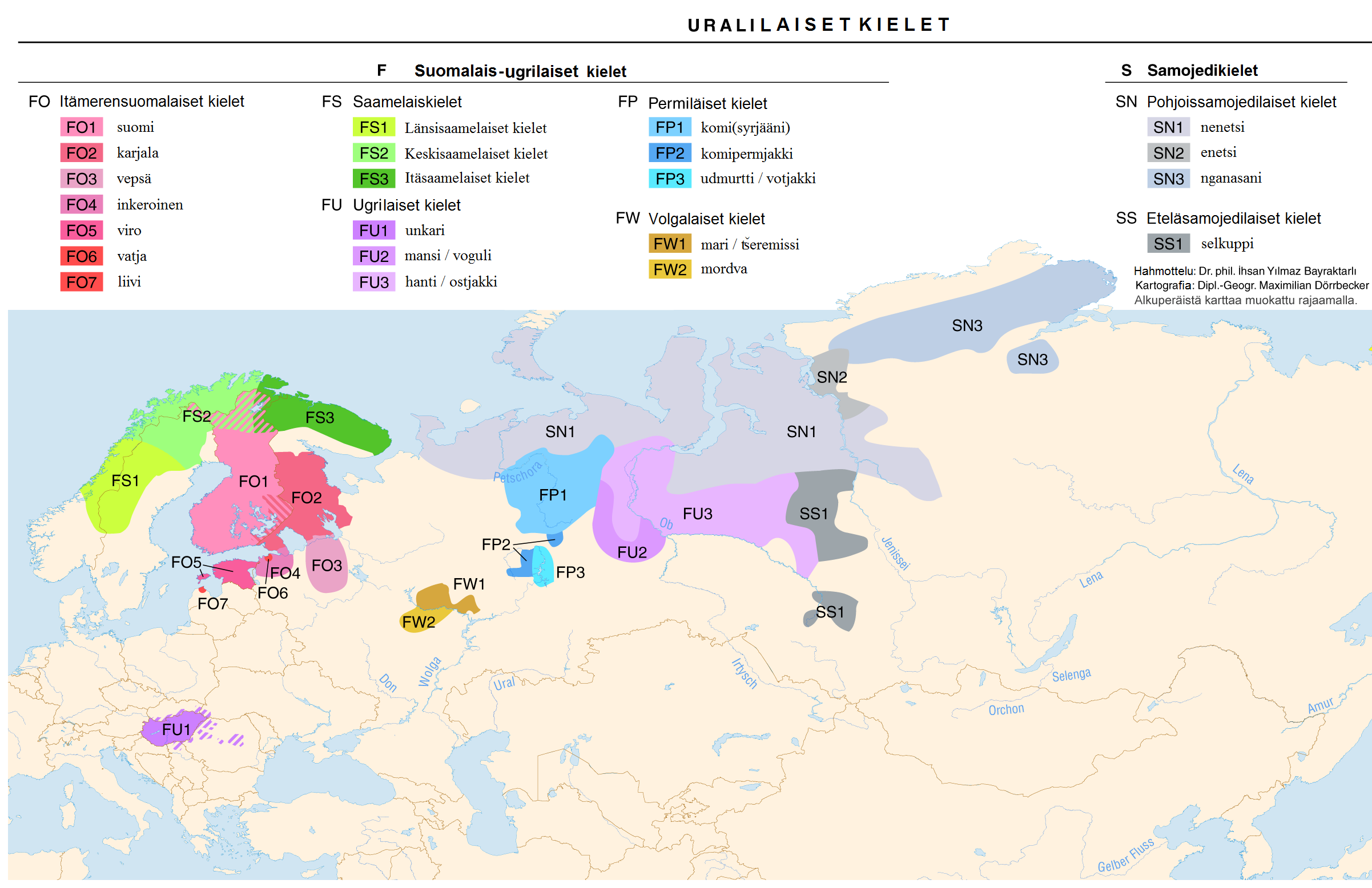 Urarilaisten kielten levinneisyys